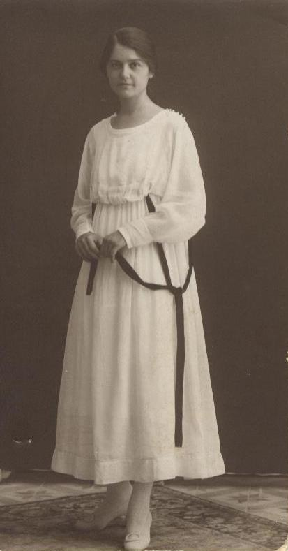 הדסה בצעירותה